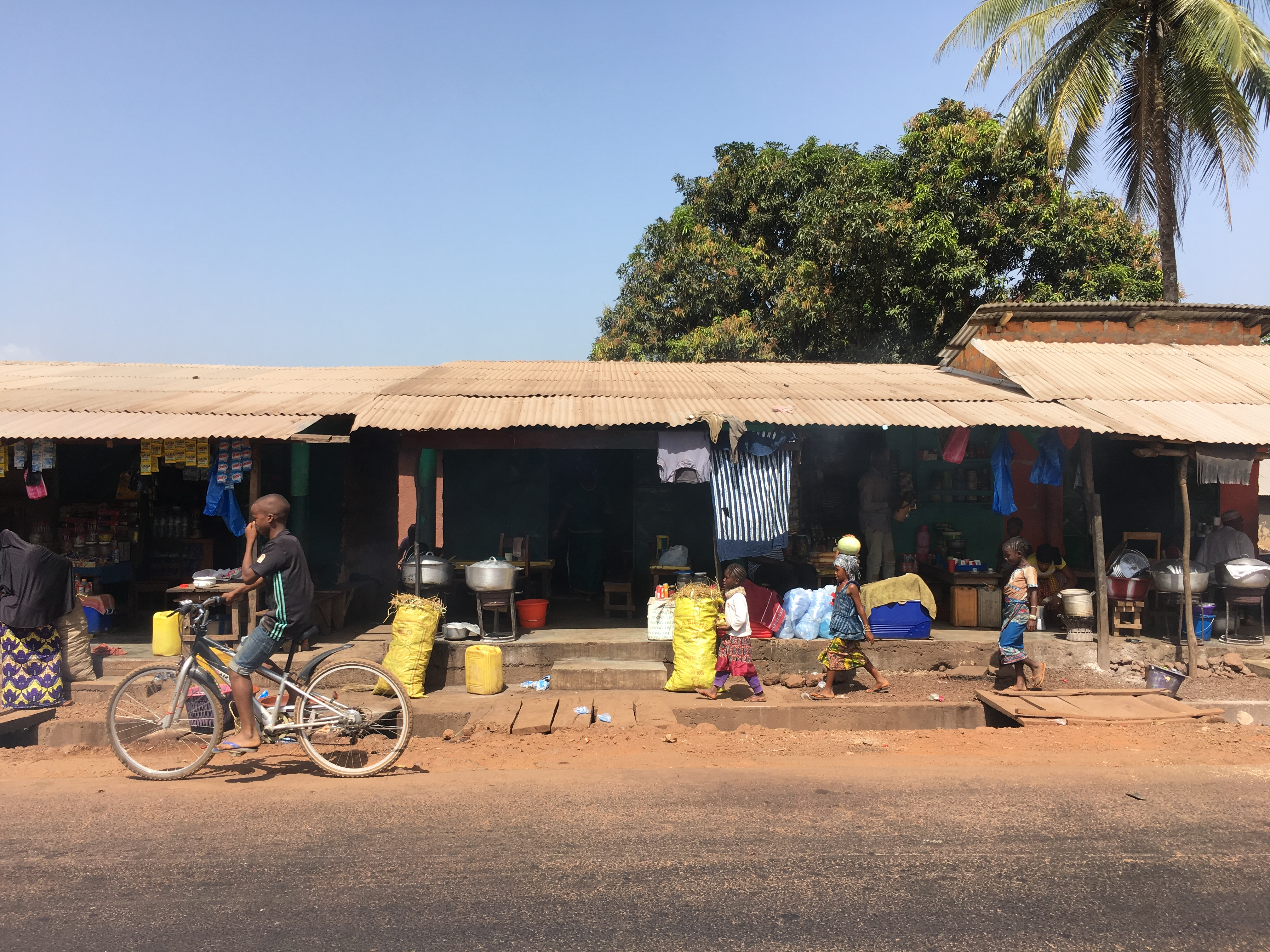 Kleine Restaurants an Hauptstrasse Richtung Faranah